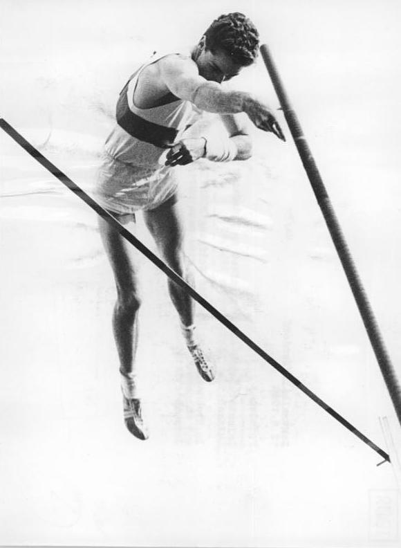 Wolfgang Nordwig Zentralbild Wendorf 12.8.1965 Potsdam Leichtathletik-Abendsportfest im Potsdamer Luftschiffhafenstadion am 11.8.65 Im Stabhochsprung stellte Wolfgang Nordwig (SC Motor Jena) mit ausgezeichneten 5,05 m eine neue europäische Jahresbestleistung auf.